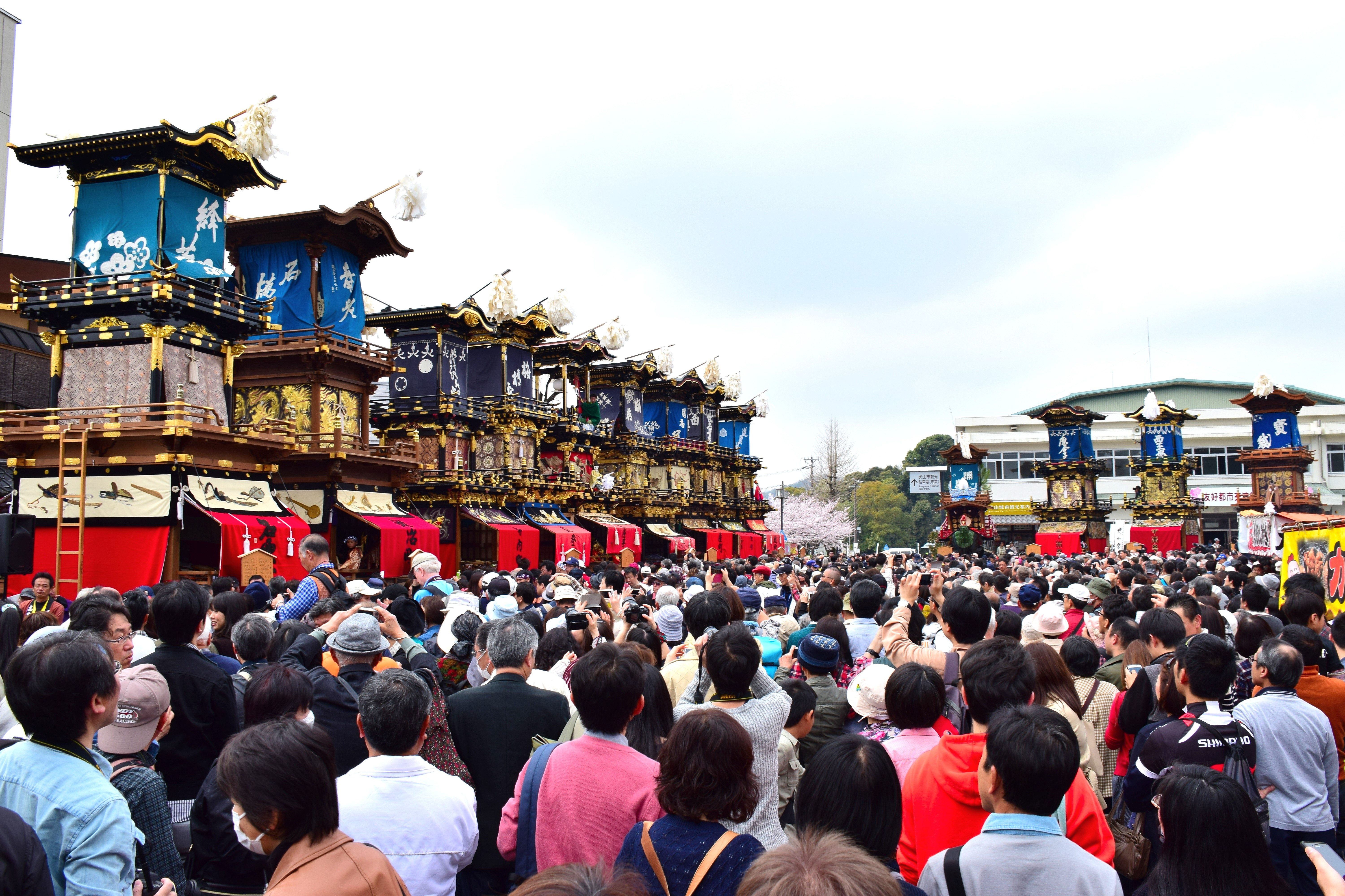 １３輛の山車が揃う